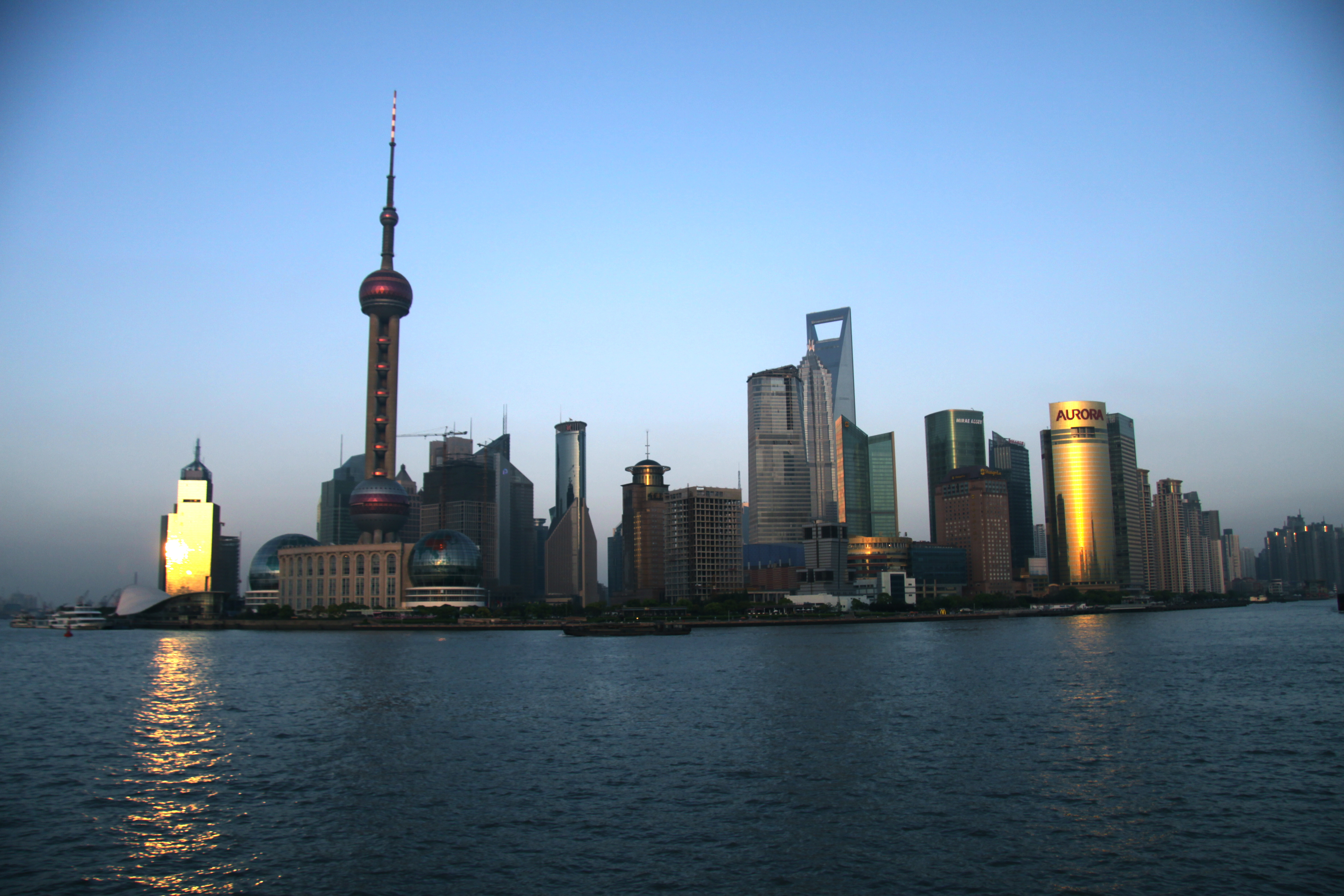 Shanghai's Lujiazui skyline in 2009